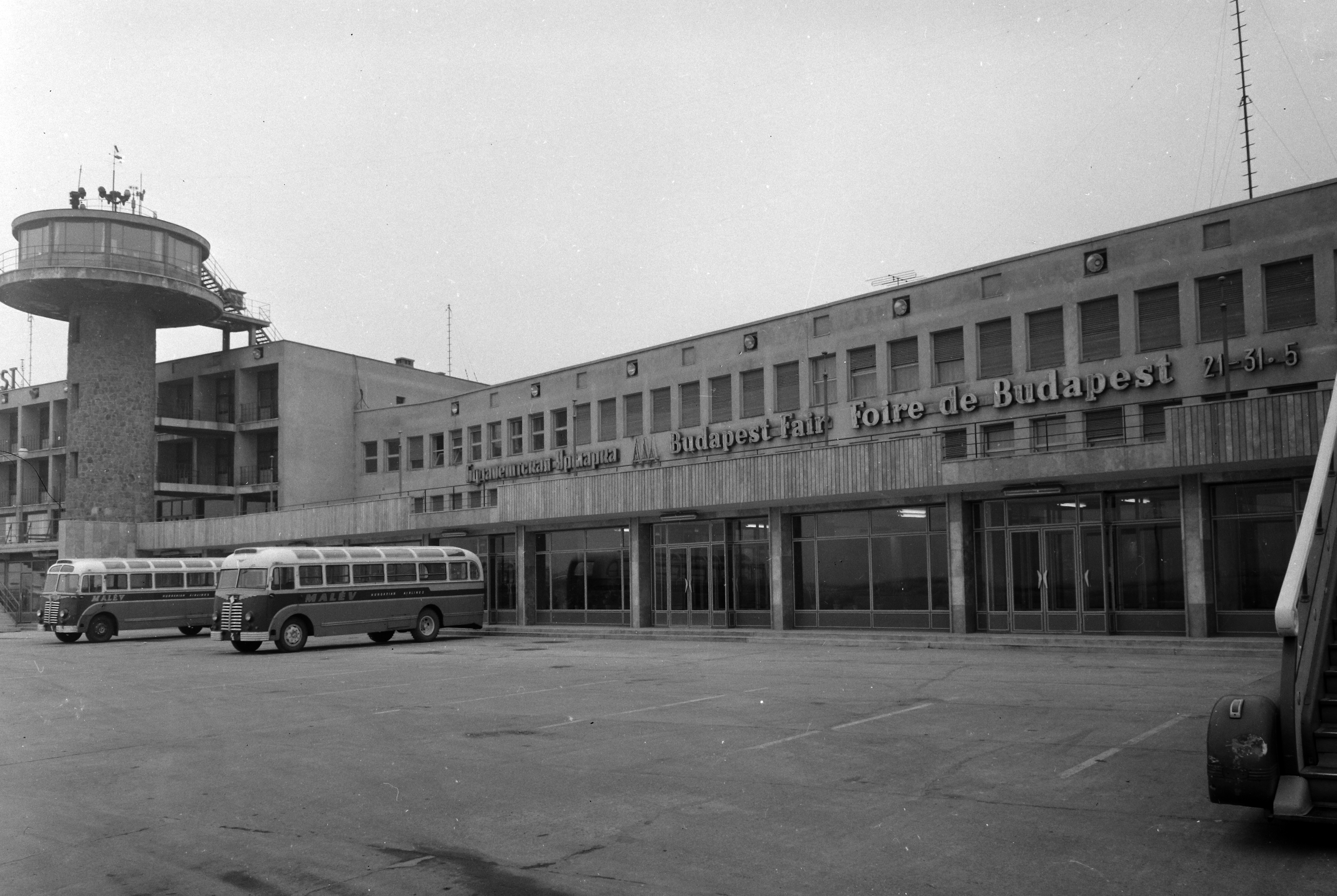 Location: Hungary, Budapest XVIII. Tags: bus, Ikarus-brand, Hungarian brand, Hungarian Airlines, aerial, Budapest